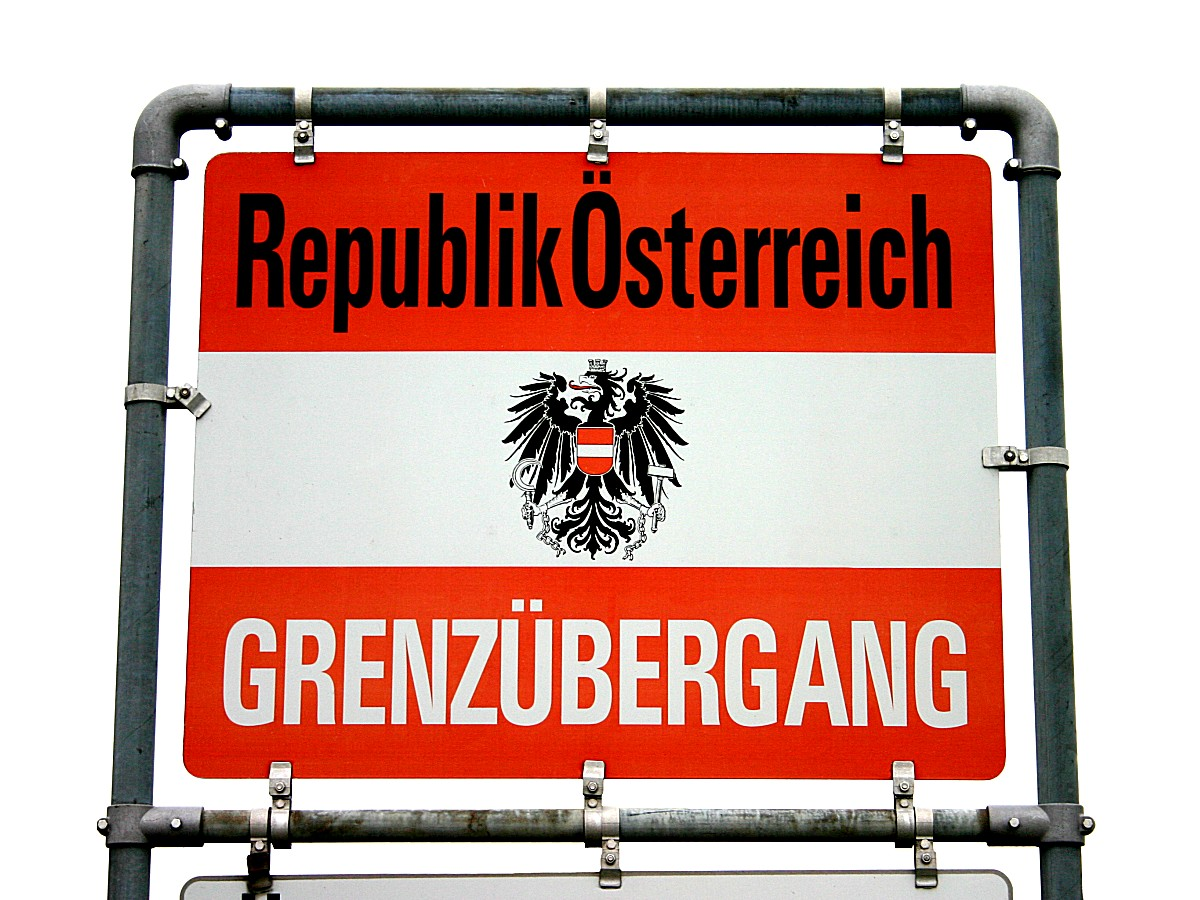 Grenzübergang_Republik_Österreich Bild 1)